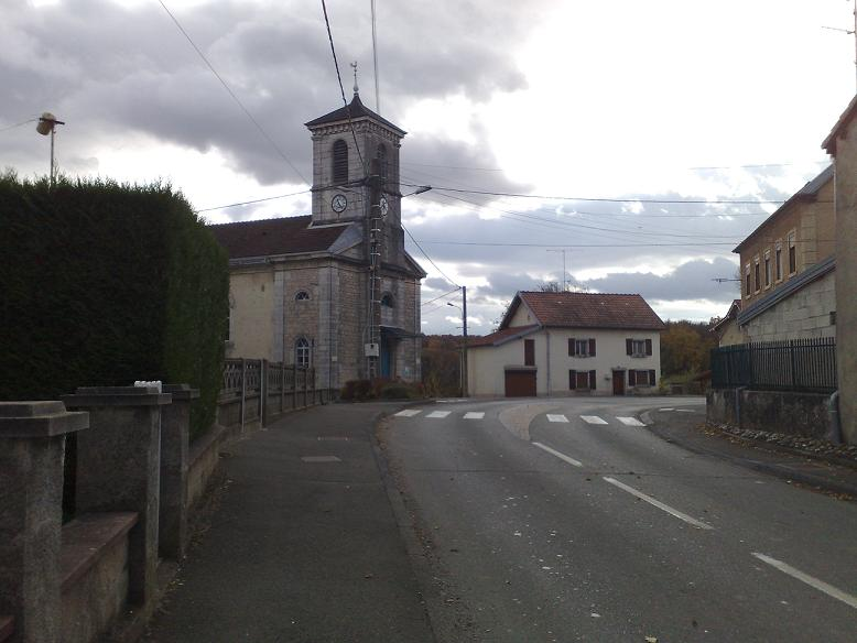 Eglise de bondeval